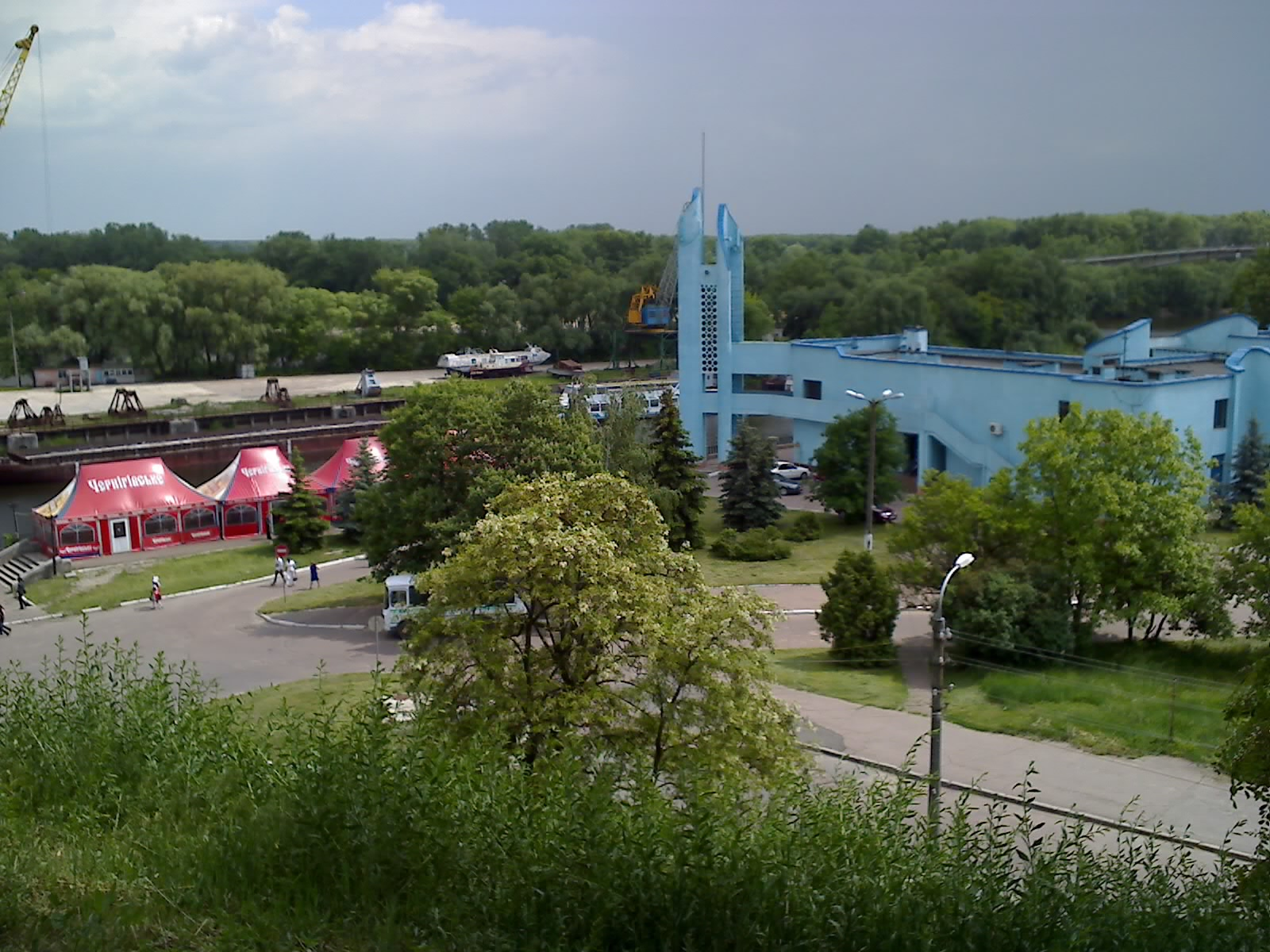 порт Чернигова